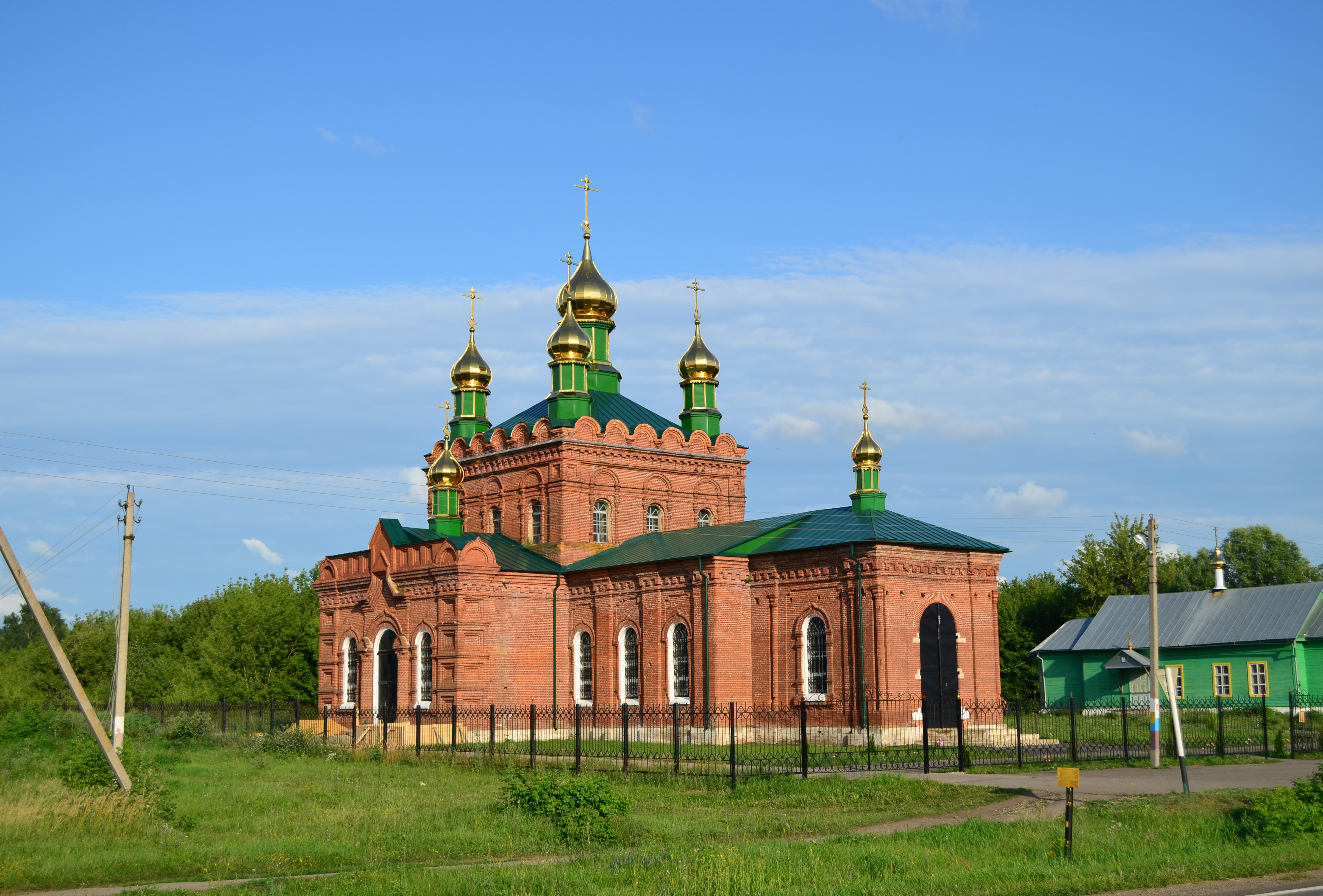 Храм Сергия Радонежского в с.Новосергиевка Александро-Невского района Рязанской области.